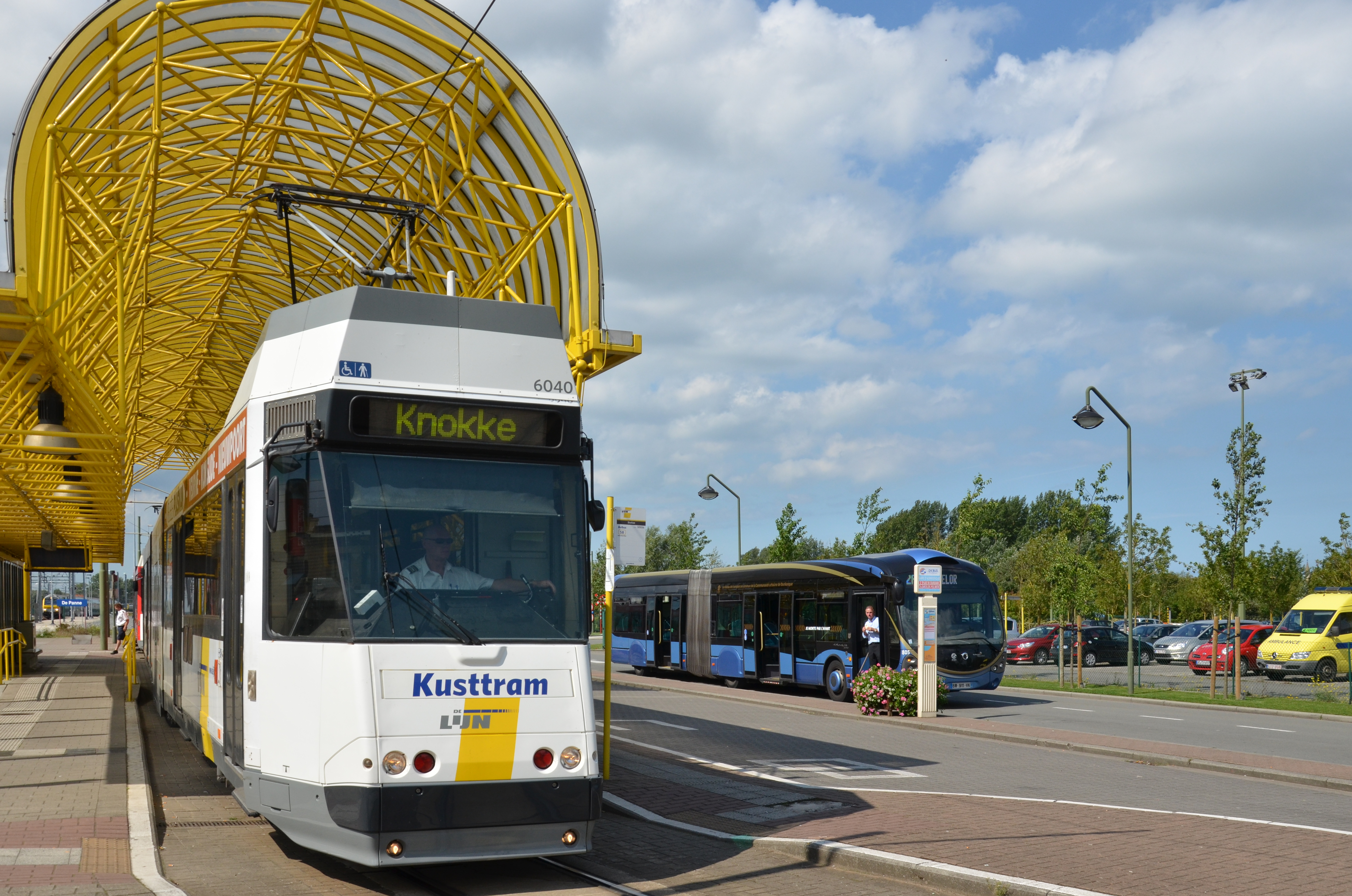 Le pôle d'échanges de la Panne (Belgique), où se côtoient les Kusttram De Lijn et les autobus articulés du réseau DK'Bus de Dunkerque.